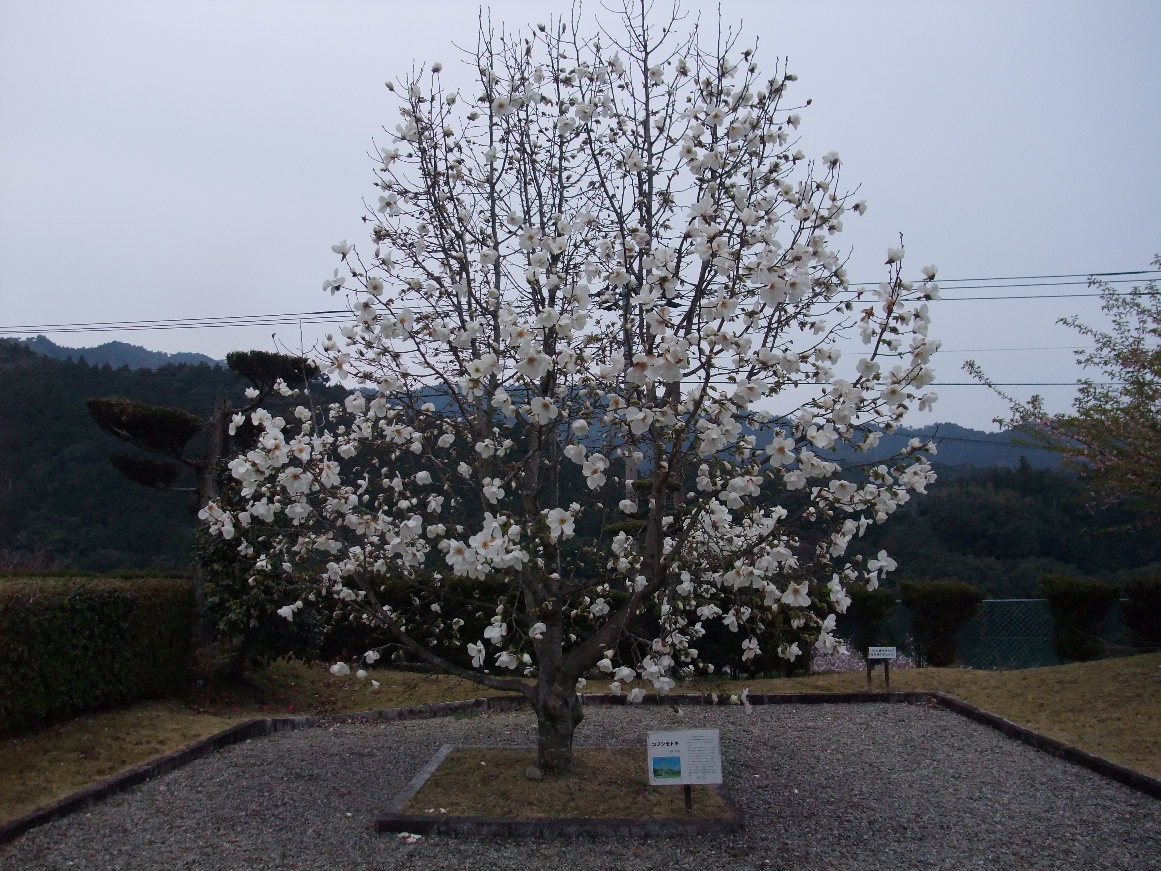 コブシモドキの木。相生森林美術館にて。セカイカメラのエアタグを現地に残してきたので、現地ではいつでも花が見られるようになりました。 学術的に貴重な植物であるため、この植物に関して投稿したすべての写真の著作権を放棄します。